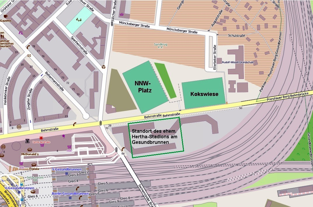 Location of football grounds at Behmstrasse, Berlin-Gesundbrunnen